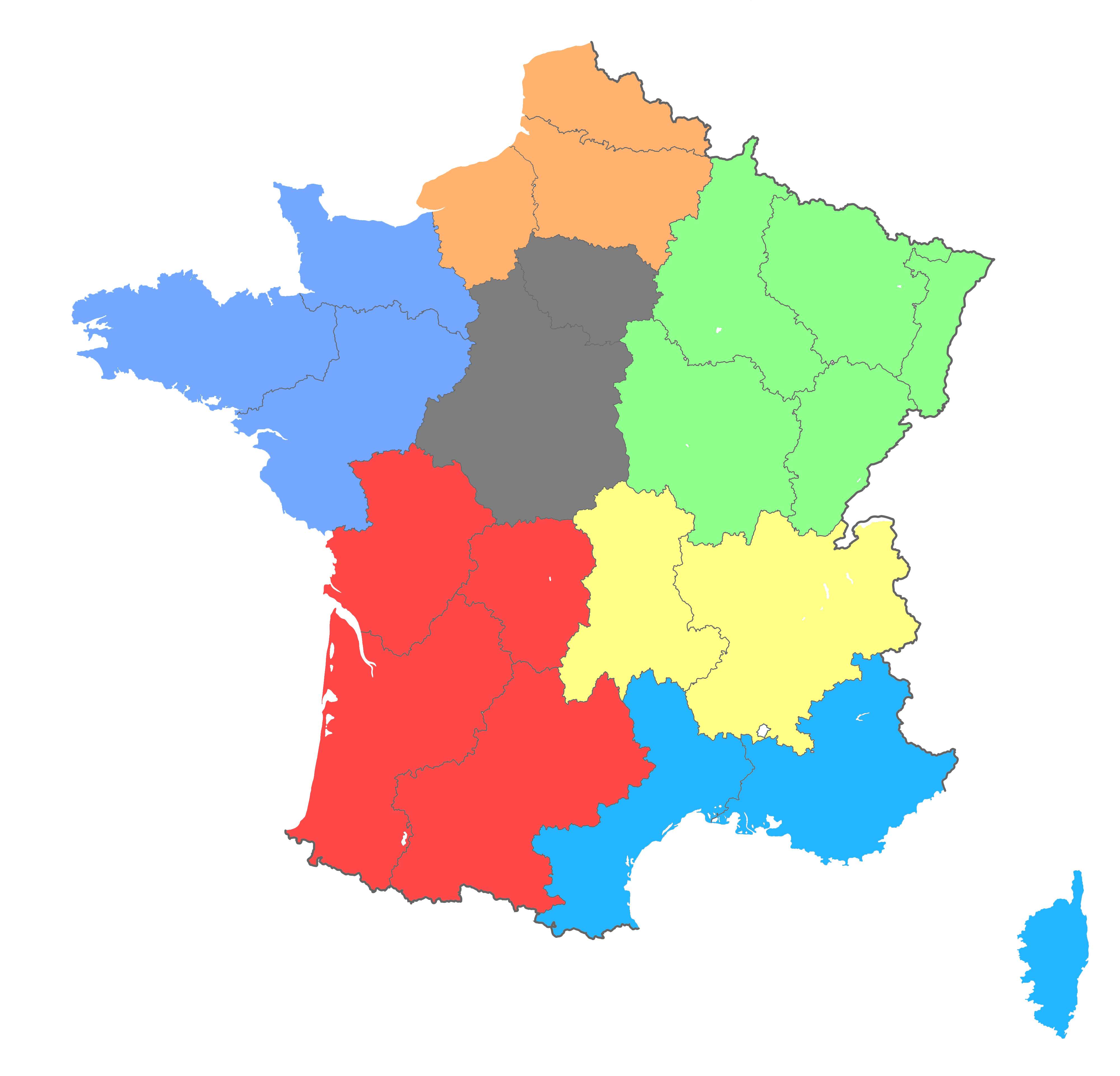 Commandement Régionaux de la Gendarmerie Nationale en 1969. Commandement Régional de la Gendarmerie Nationale de Paris 2e Commandement Régional de la Gendarmerie Nationale de Lille 3e Commandement Régional de la Gendarmerie Nationale de Rennes 4e Commandement Régional de la Gendarmerie Nationale de Bordeaux 5e Commandement Régional de la Gendarmerie Nationale de Lyon 6e Commandement Régional de la Gendarmerie Nationale de Metz 7e Commandement Régional de la Gendarmerie Nationale de Marseille